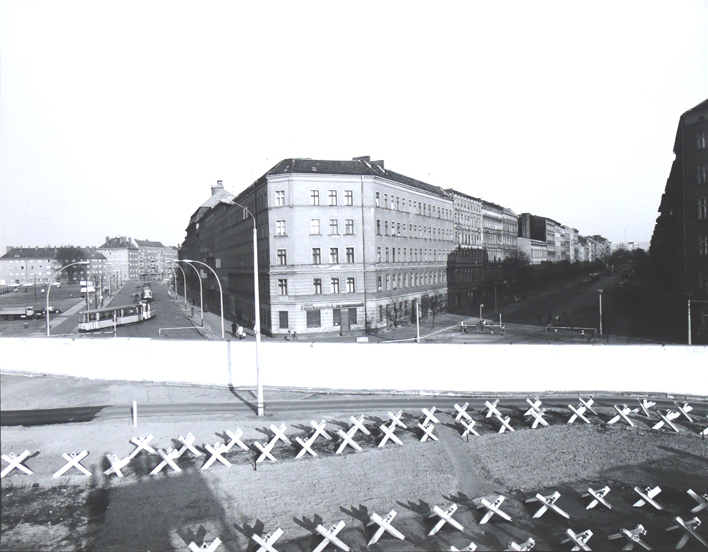 Bernauer Straße, Blick auf Eberswalder Straße, Grenzanlage Wedding/Prenzlauer Berg